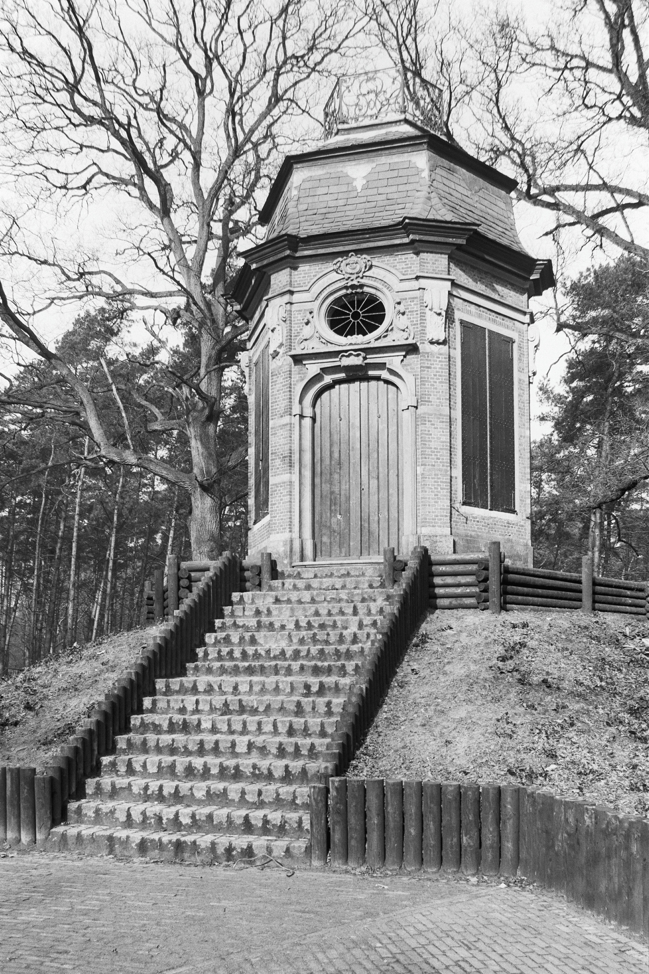 Gloriette: Voorzijde van het achtkantige theehuis de Gloriëtte. Het theehuis heeft een mansardedak met uitzichtplat.